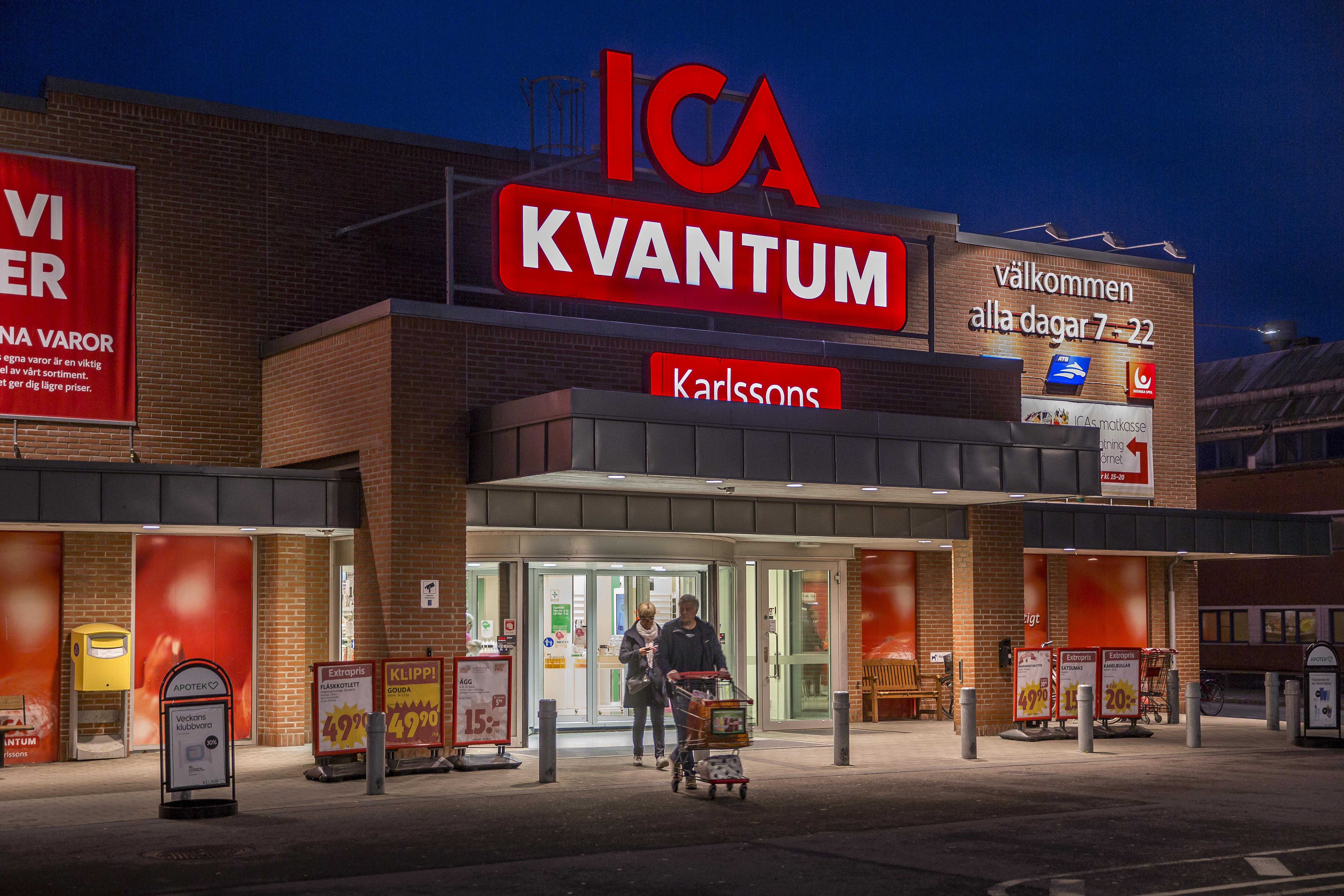 Ica Kvantum - Ica Karlssons i Svedala som ligger mellan Malmö och Sturup...Photo: News Øresund - Johan Wessman.© News Øresund - Johan Wessman (CC BY 3.0)..Detta verk av News Øresund är licensierat under en Creative Commons Erkännande 3.0 Unported-licens (CC BY 3.0). Bilden får fritt publiceras under förutsättning att källa anges. .The picture can be used freely under the prerequisite that the source is given. News Øresund, Malmö, Sweden.News Øresund är en oberoende regional nyhetsbyrå som är en del av det oberoende dansk-svenska kunskapscentrat Øresundsinstituttet...